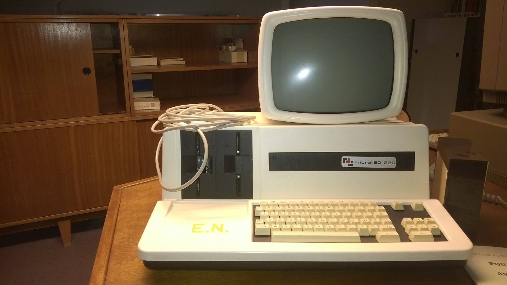 Micral 80-22G, configuration AZERTY.